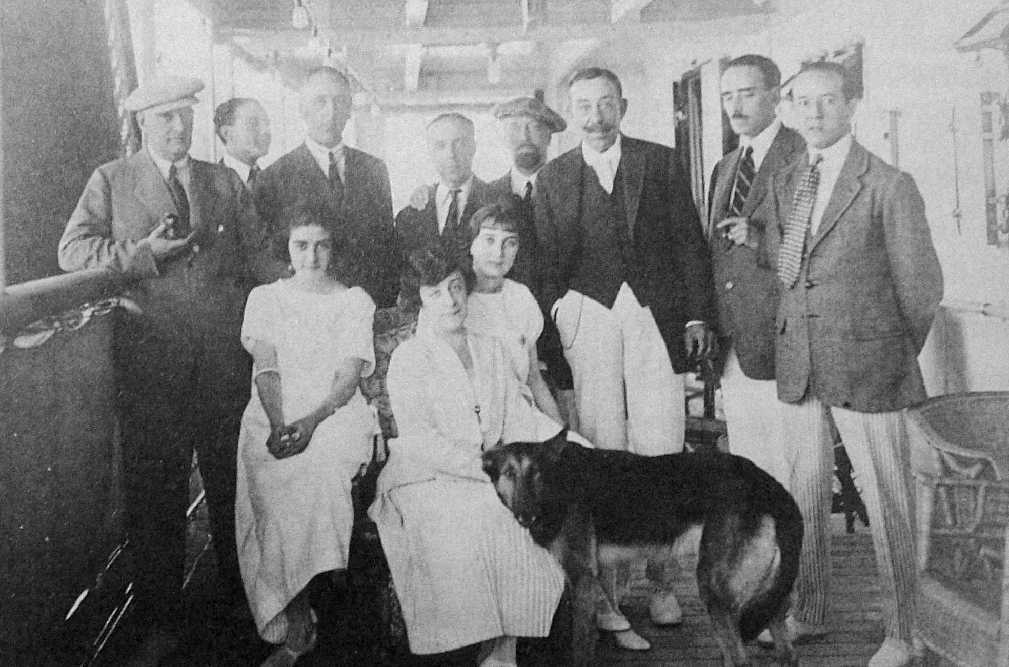 Es una foto del entonces vencedor Presidente Marcelo T. de Alvear en el barco que lo trajo de vuelta a la Argentina, para ser presidente por seis años.